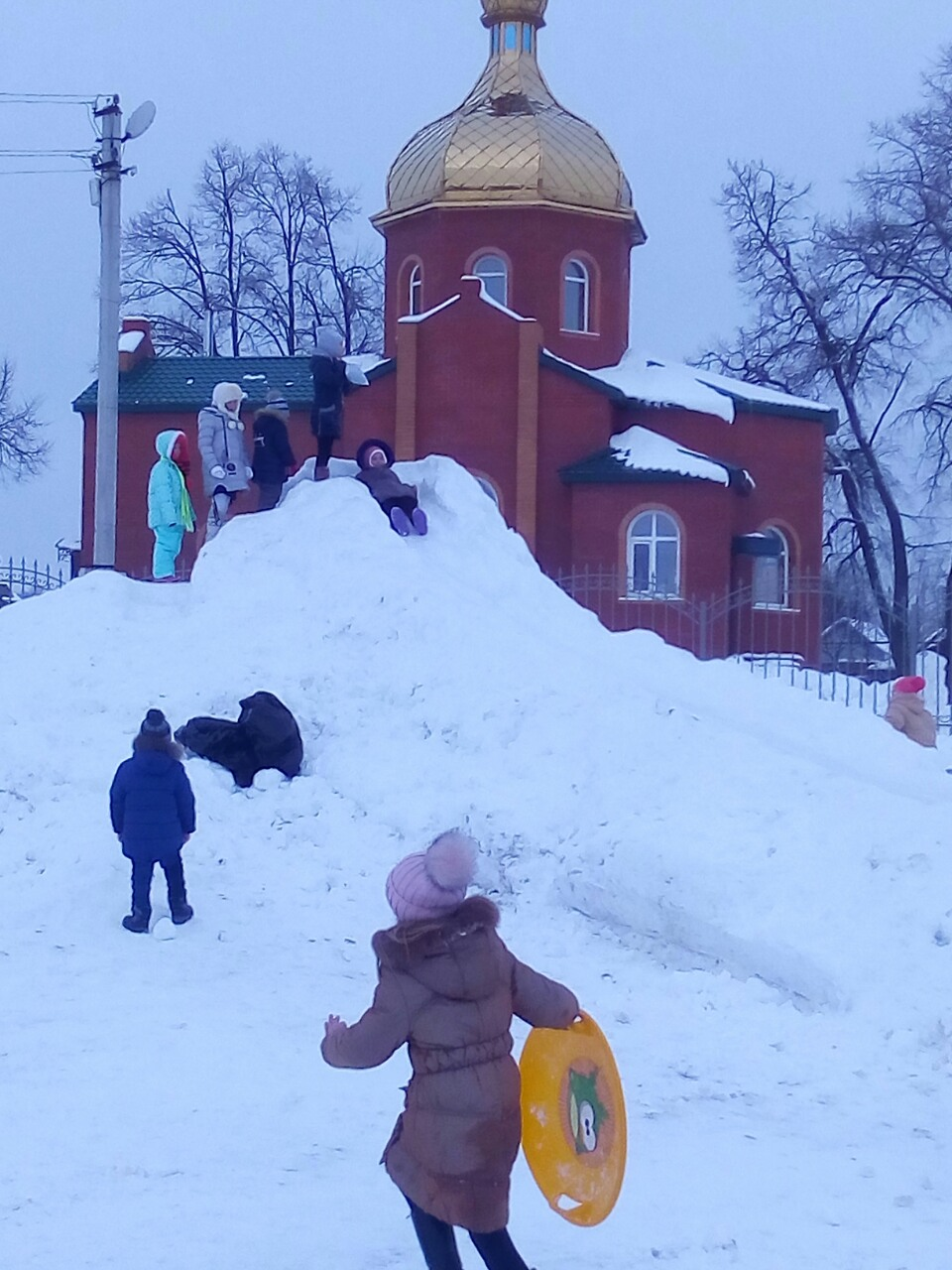 Ольшана Масляная